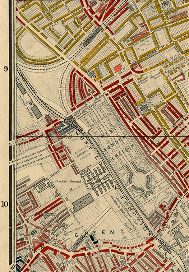 Mapa Charlesa Bootha z 1889